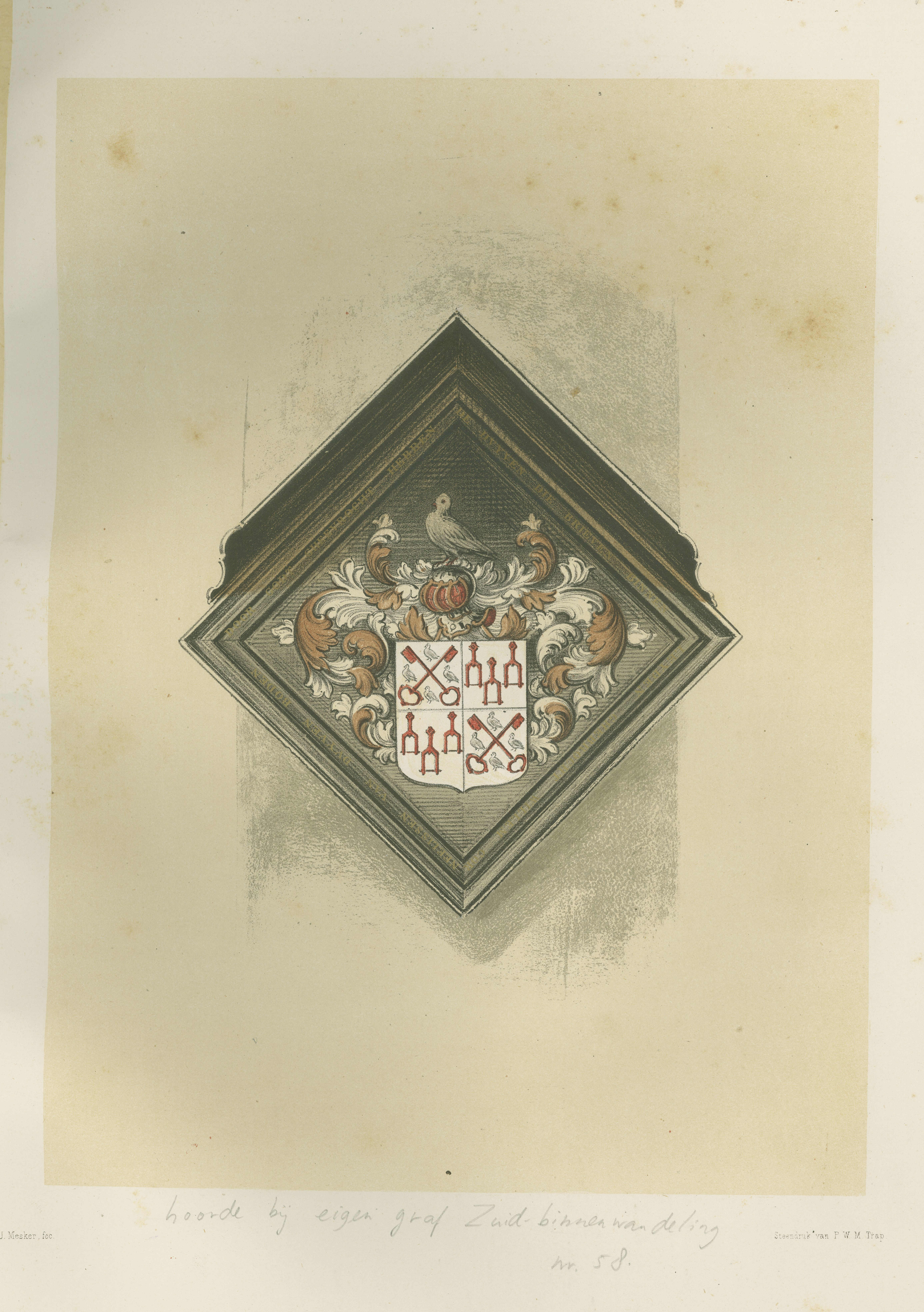 code of Arms Willem Corneliszn Speelman, genaamd Duyvenbode